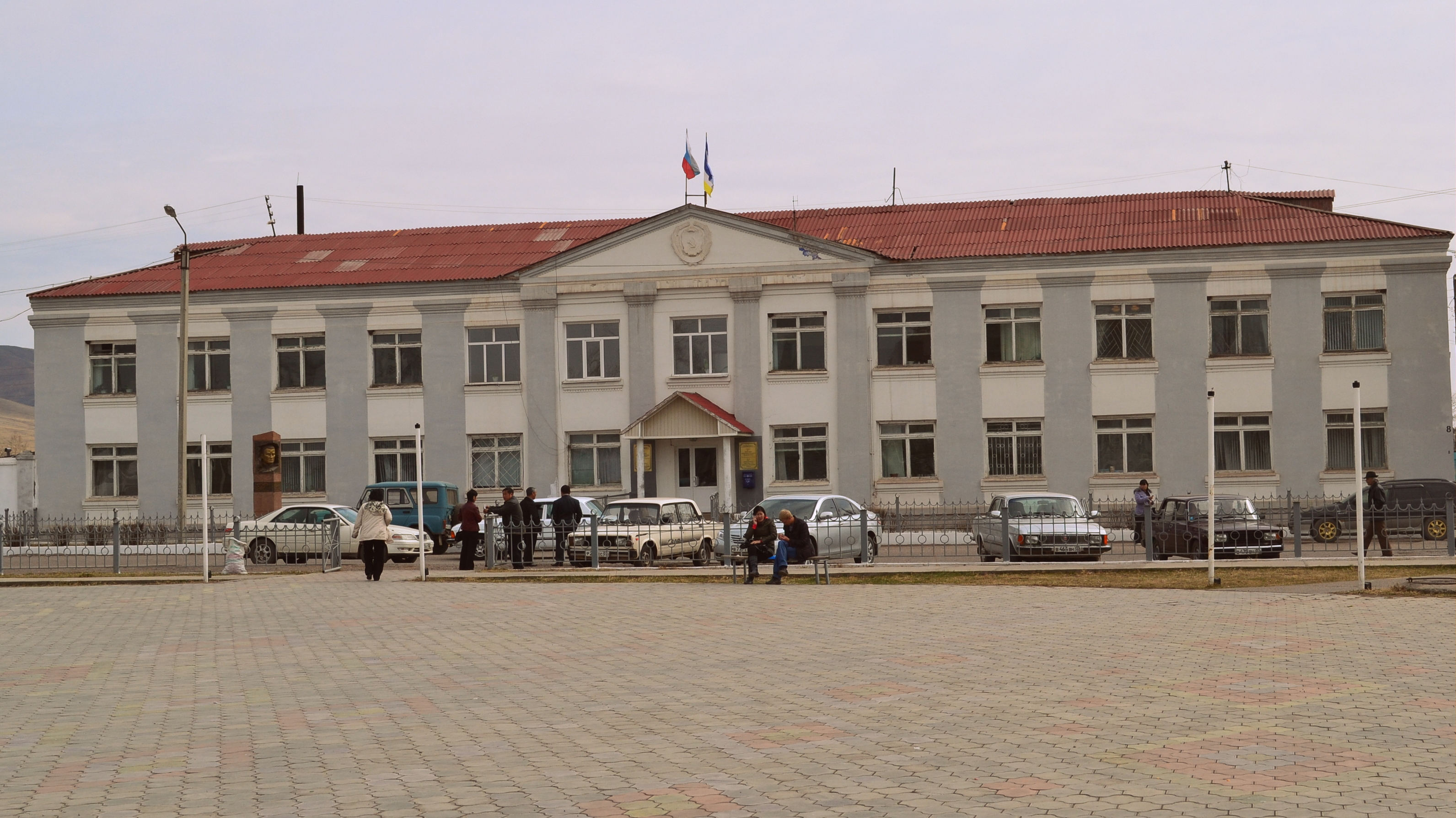 Здание администрации Джидинского района, село Петропавловка, Джидинский район, Бурятия